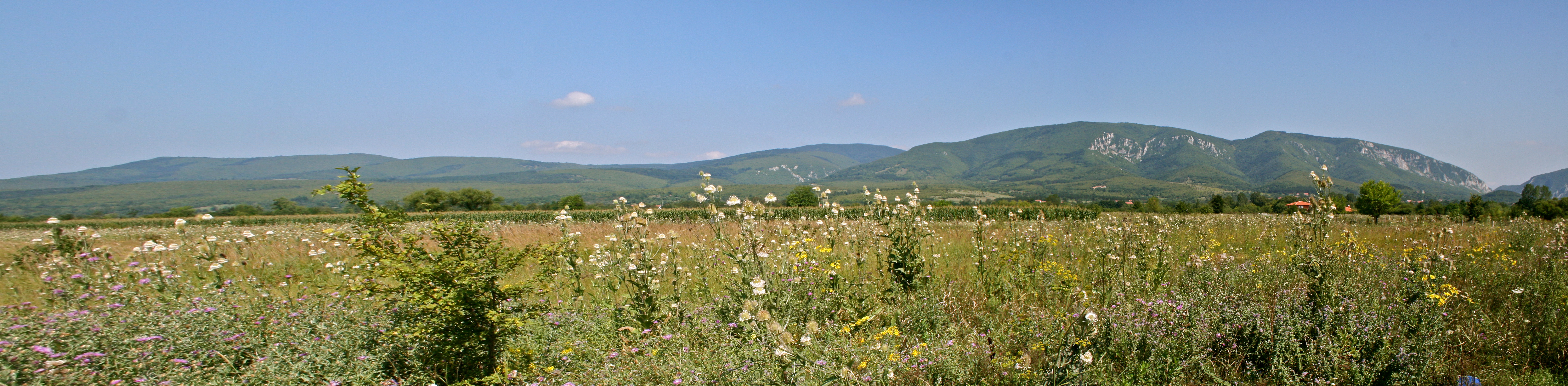 Хомољске планине - Велики Вукан и шире, западна страна, сликано са Регионалног пута 105 код Бање Ждрело